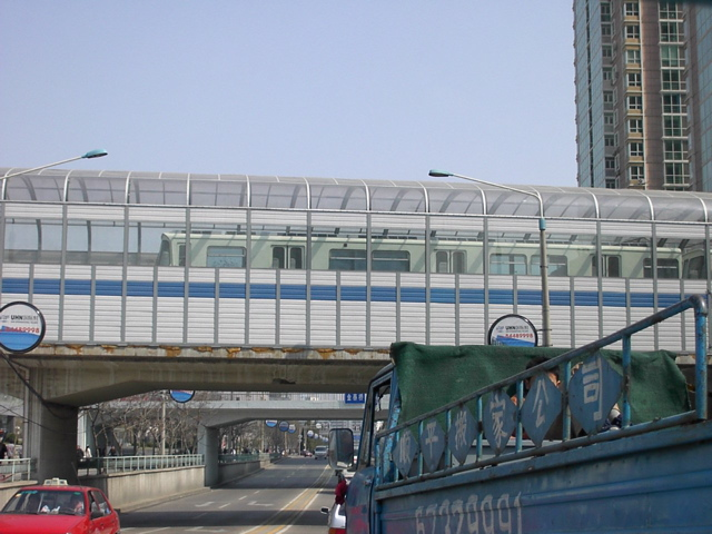 Beijing Underground, Line 13 at Liufang (NE Beijing)